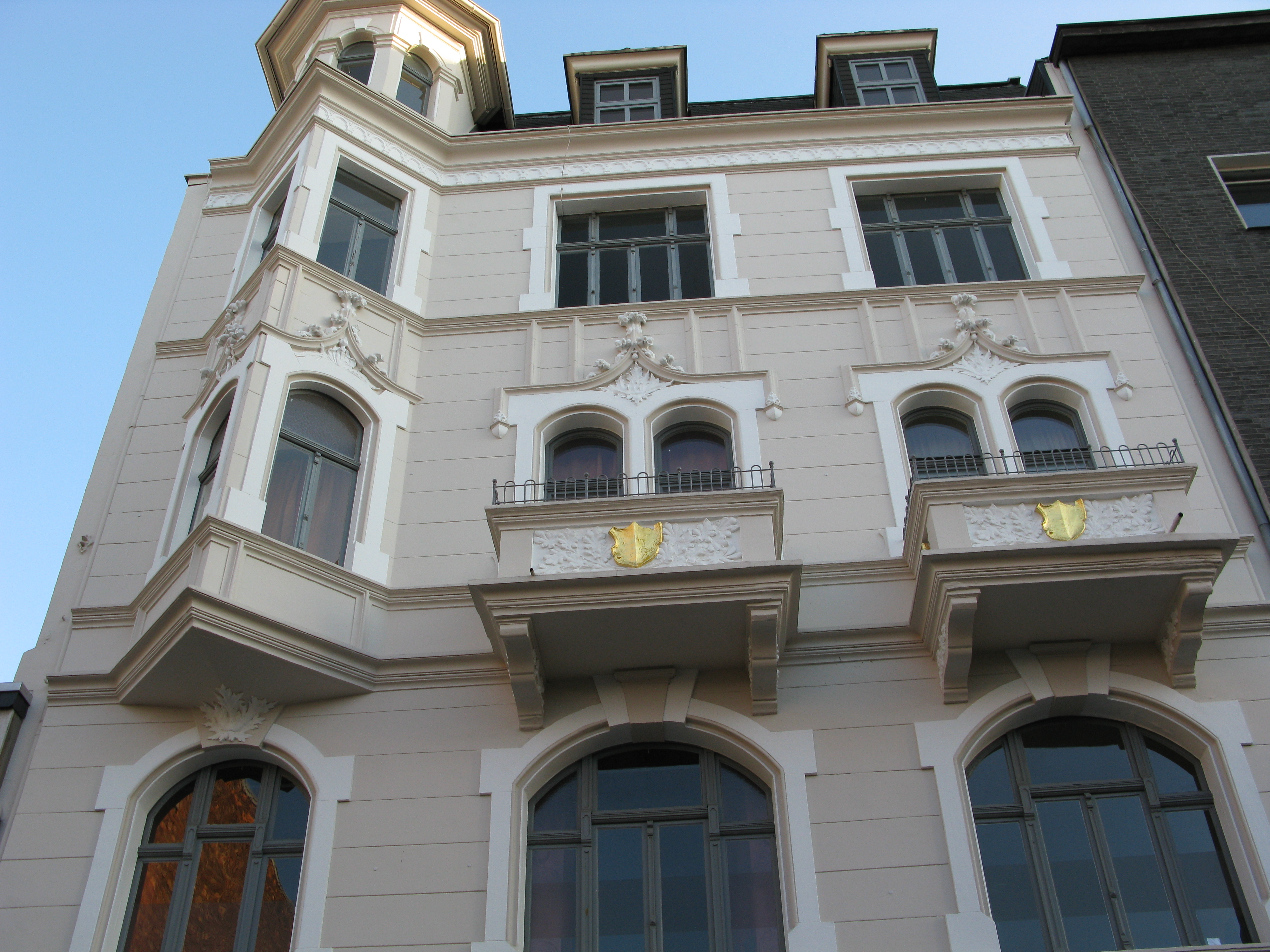 Ansicht des Baudenkmals vom Sonnenwall aus (Fußgängerzone).